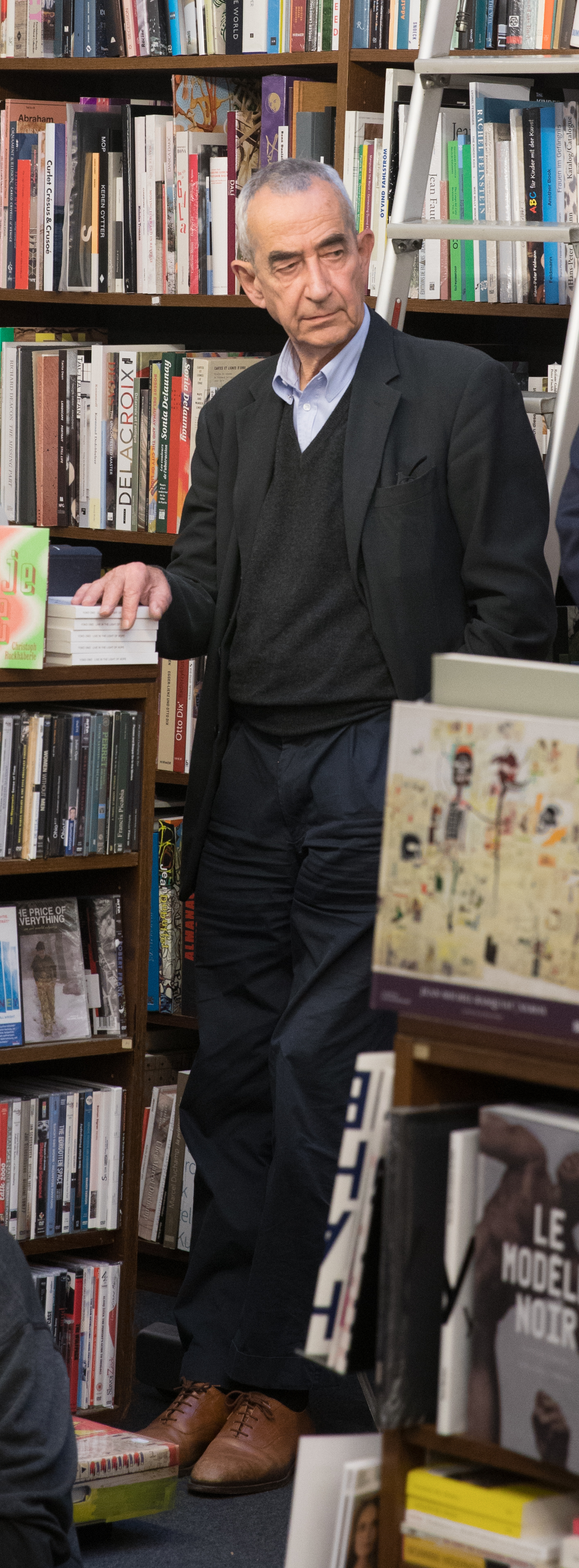 Diskussionsveranstaltung in der Buchhandlung Walther König, anlässlich der Präsentation des Reprints der Kölner Untergrund-Zeitung ANA & BELA - Kölnisches Volksblatt. Mit Walther König, Jürgen Wilhelm, Dorothee Joachim, Rainer Kippe und Dr. Hubertus Neuhausen.